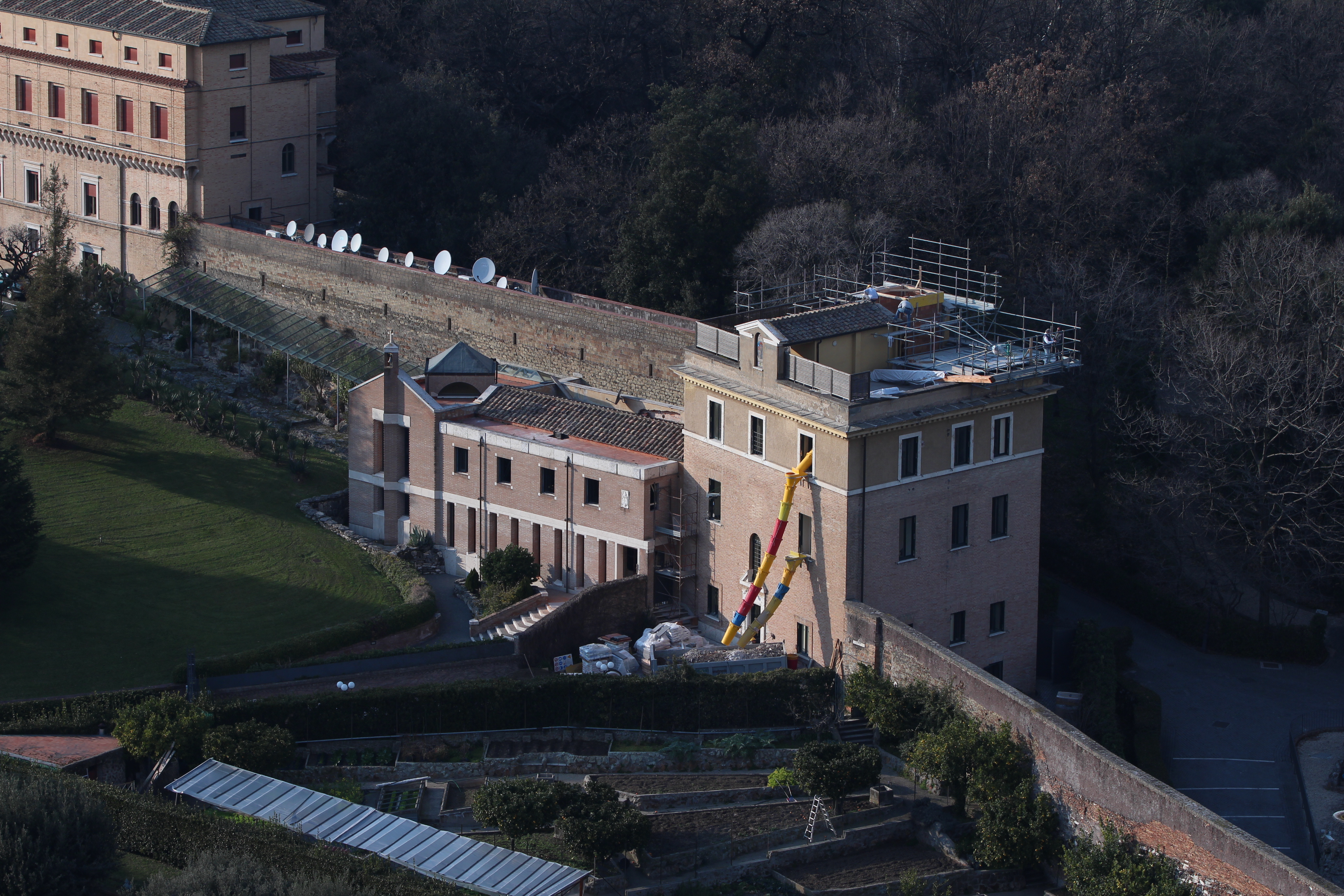 Mater Ecclesiae von der Kuppel des Petersdoms